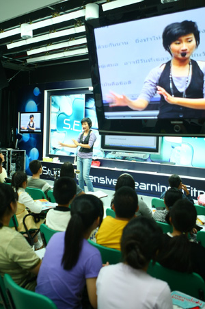 ภาพห้องเรียนของเอ็นคอนเส็ปท์